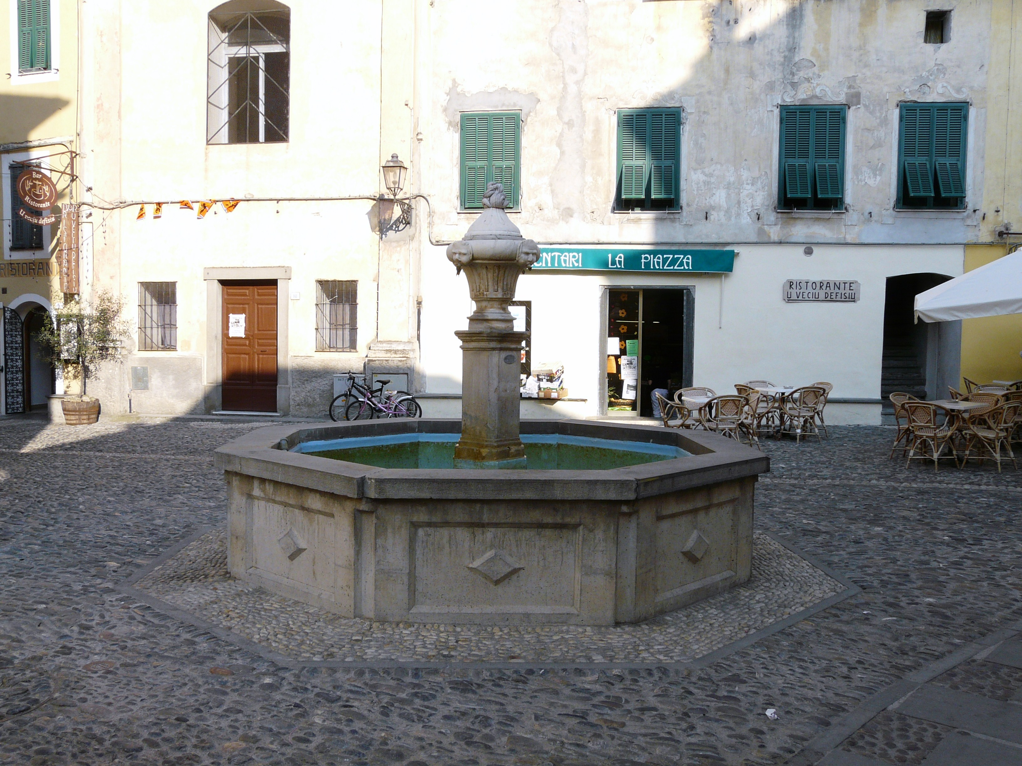 Fontana di Airole, Liguria, Italia